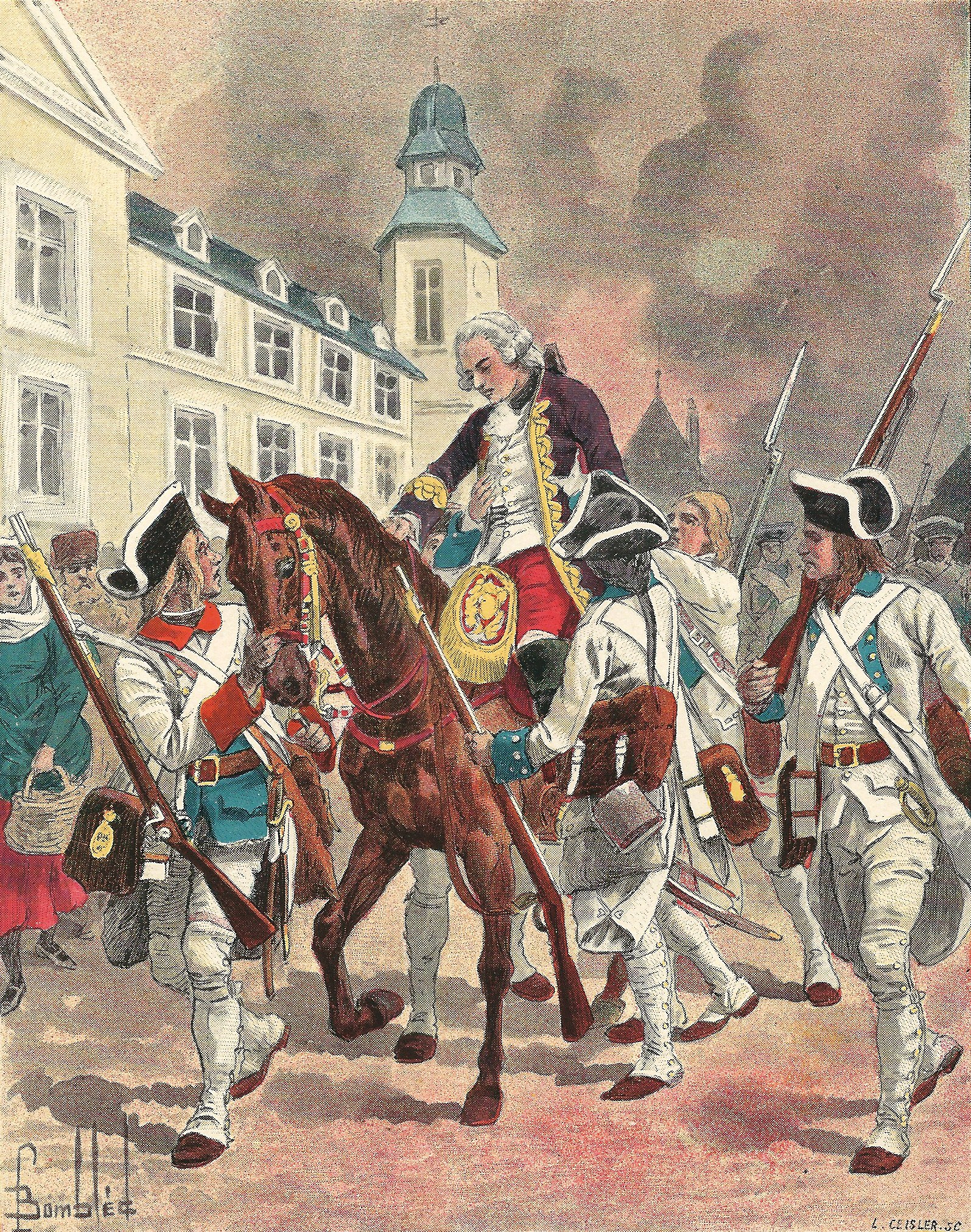 Montcalm blessé est ramené à Québec Illustration tirée de l'Histoire de la Nouvelle France d'Eugène Guénin